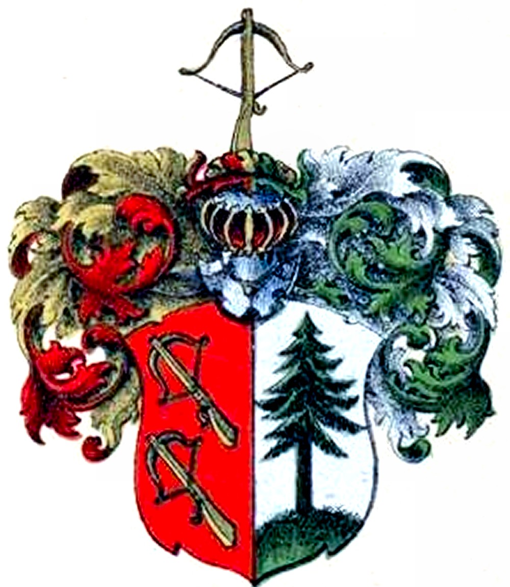 Zoeckelli suguvõsa aadlivapp